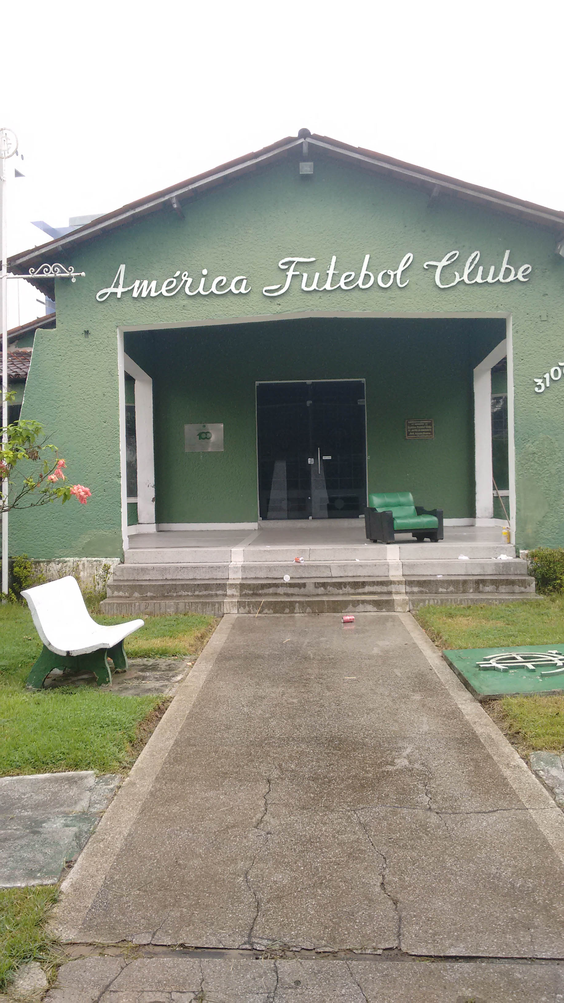 Sede do América Futebol Clube (Pernambuco), na Estrada do Arraial, Recife.